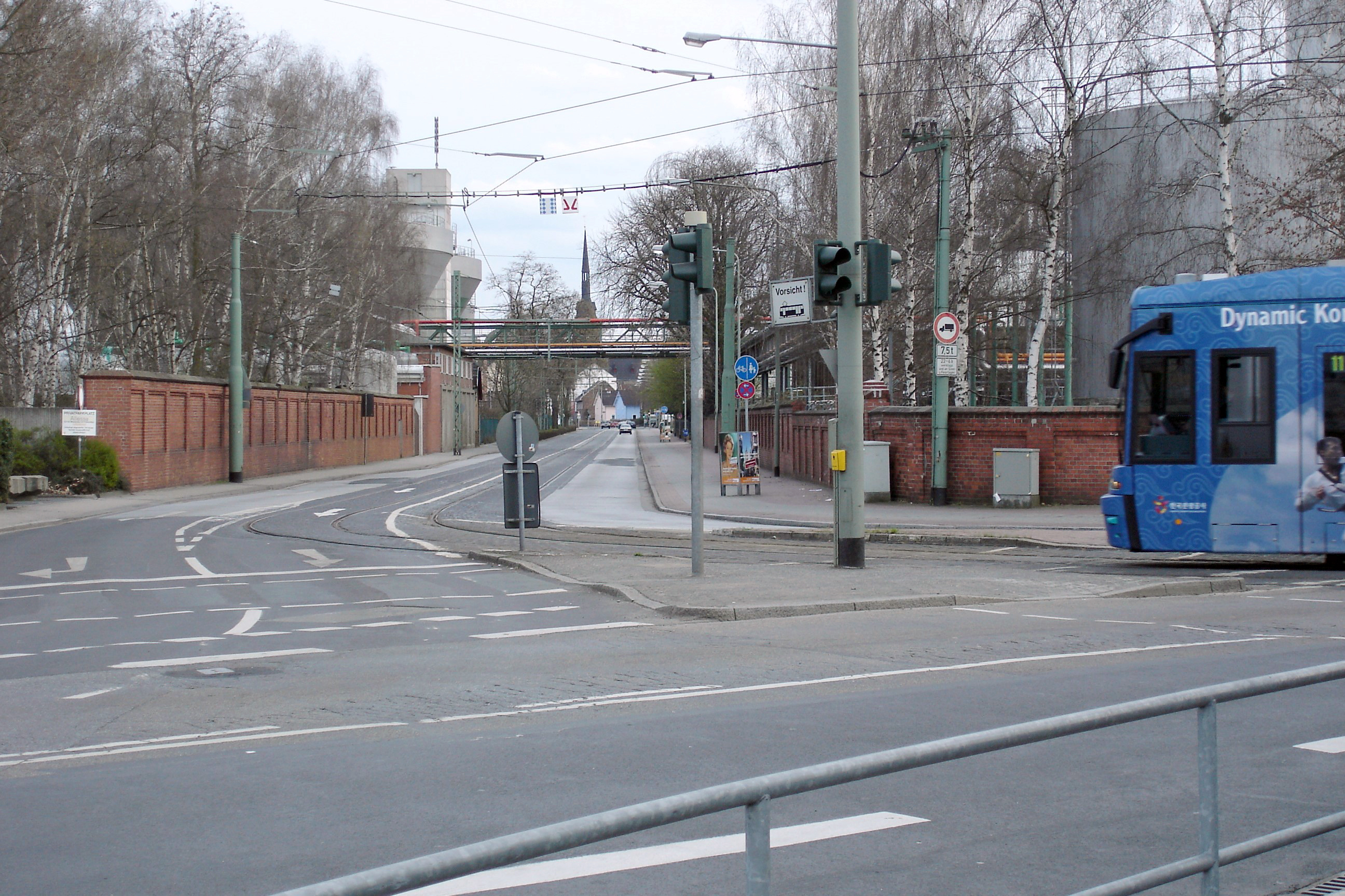 Blick von Mainkur-Kreisel, Abbiegung der Straßenbahn Linie 11 von der Straße "Alt Fechenheim" in die Hanauer Landstraße in Ffm-Fechenheim